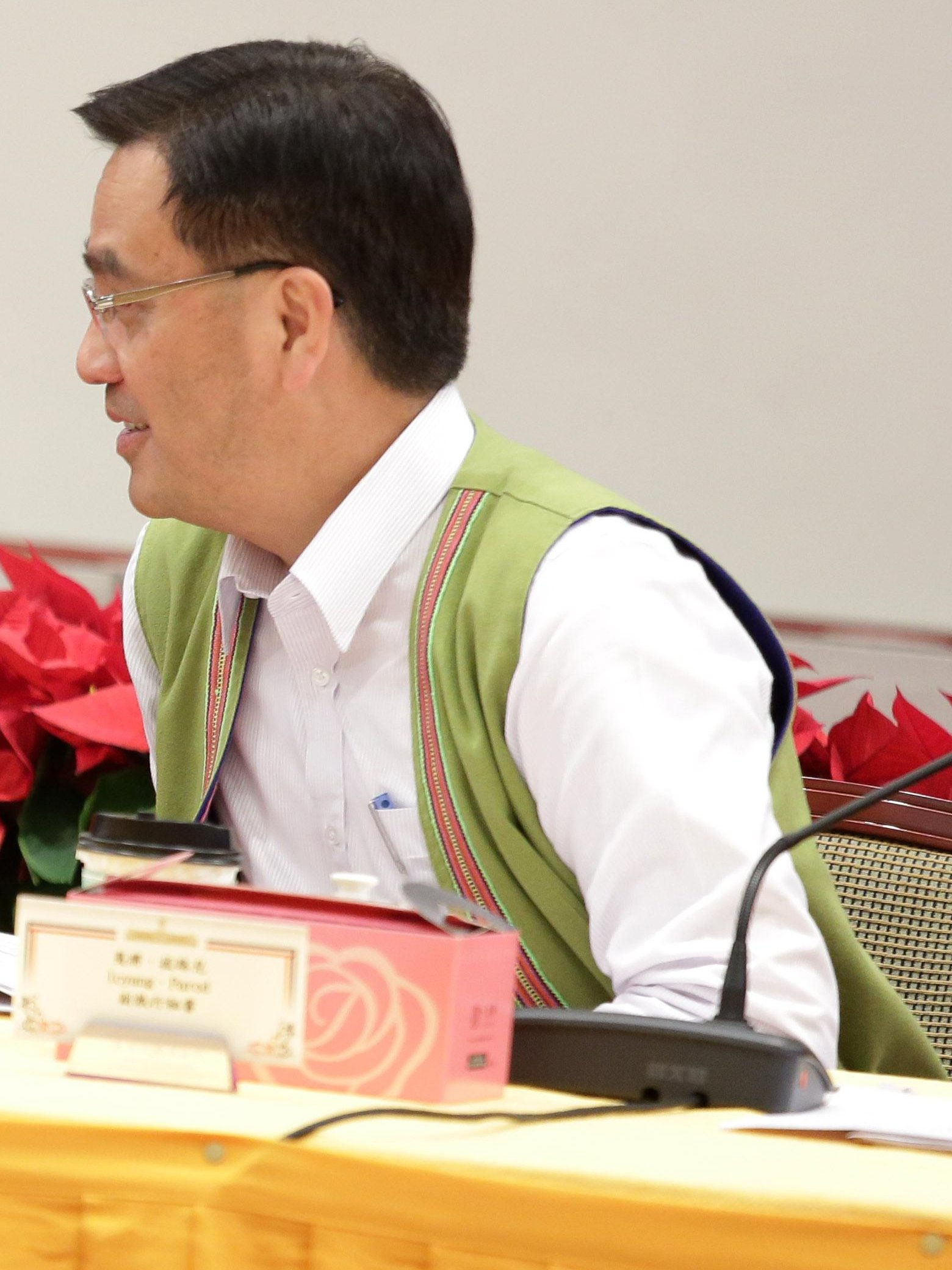 中華民國原住民族委員會主任委員夷將·拔路兒出席「總統府原住民族歷史正義與轉型正義委員會預備會議」。